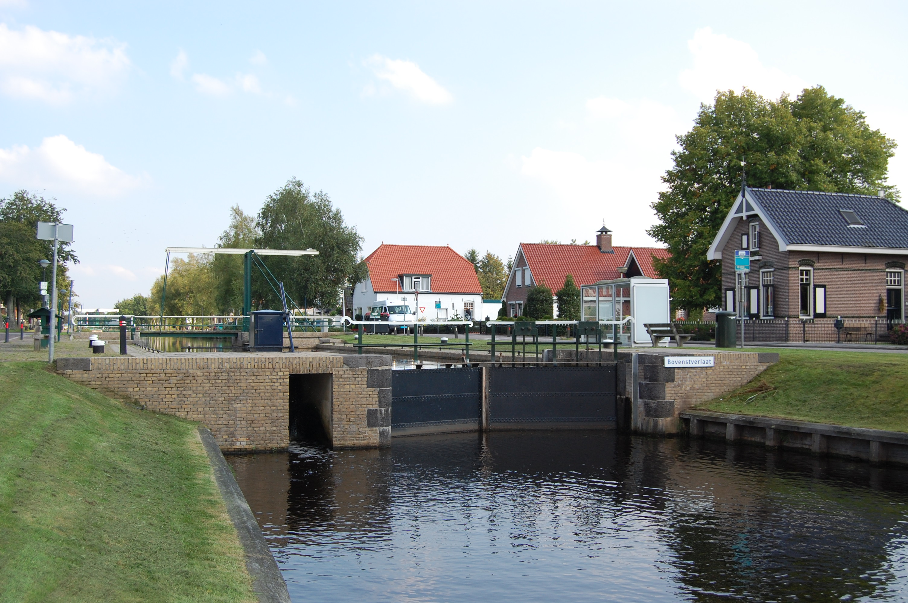 Het Bovenstverlaat te Appelscha in de Opsterlandse-Compagnonsvaart